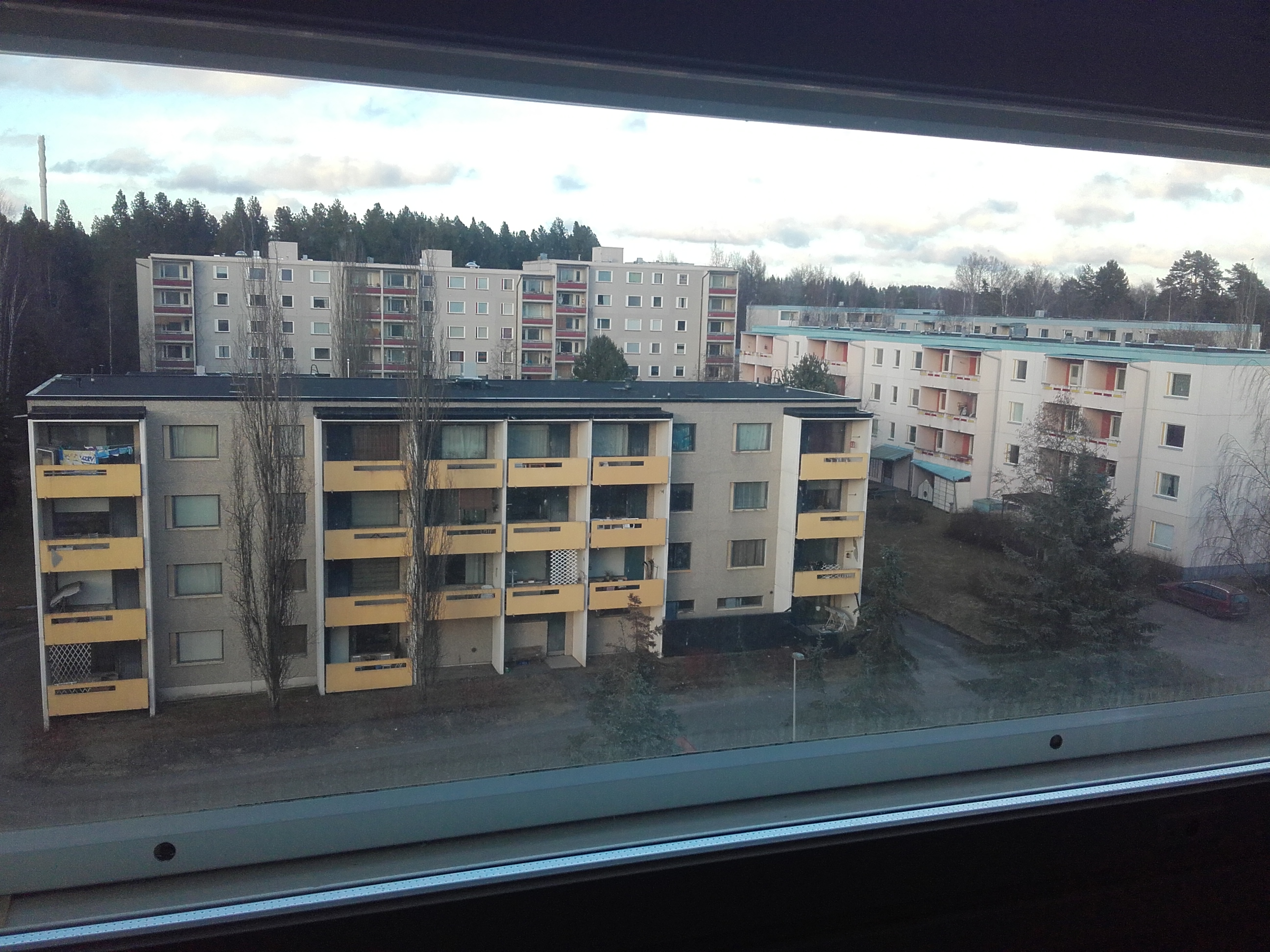 Nummi